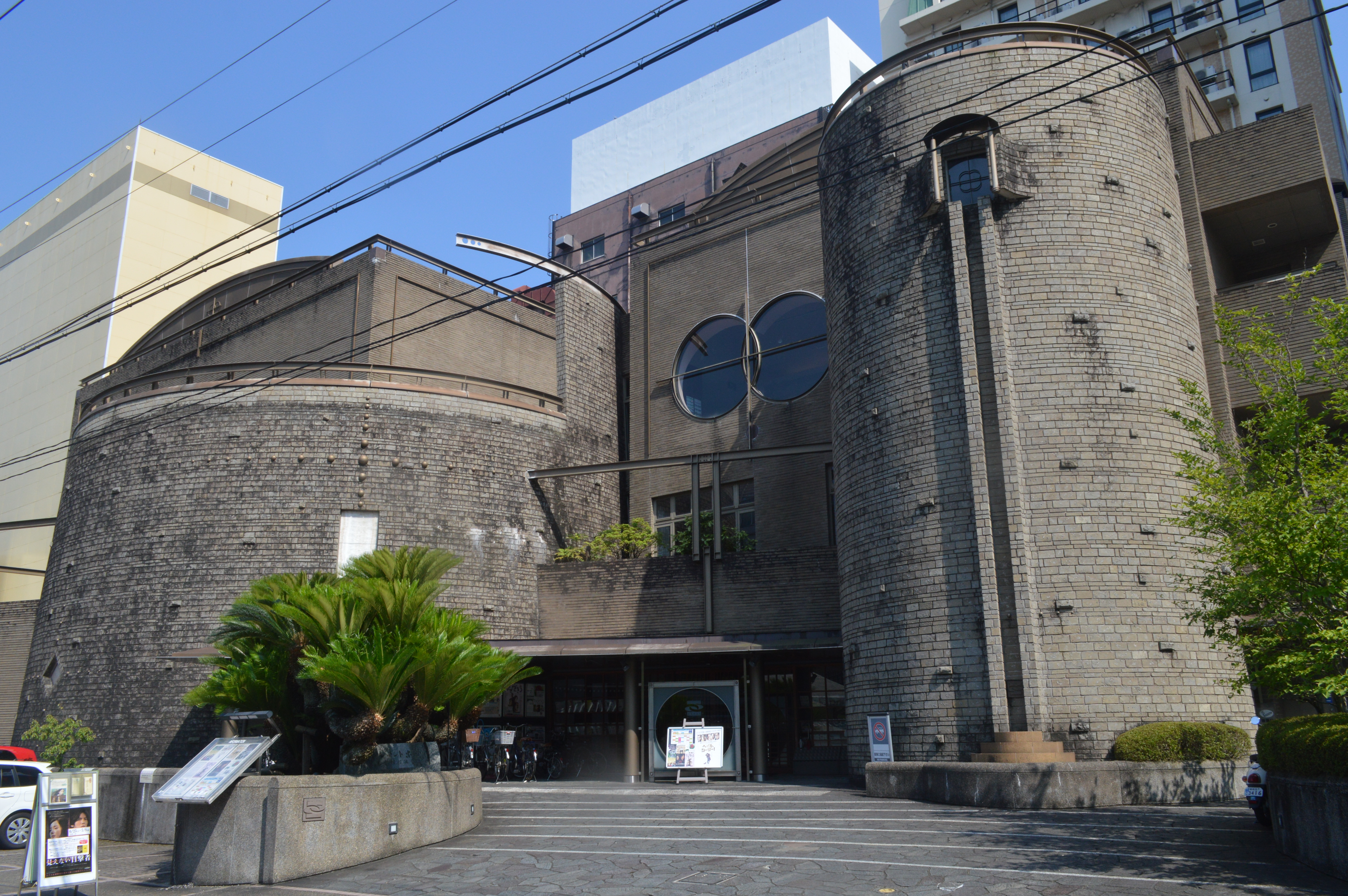 静岡市のサールナートホール。映画館（ミニシアター）の静岡シネ・ギャラリーなどが入っている。